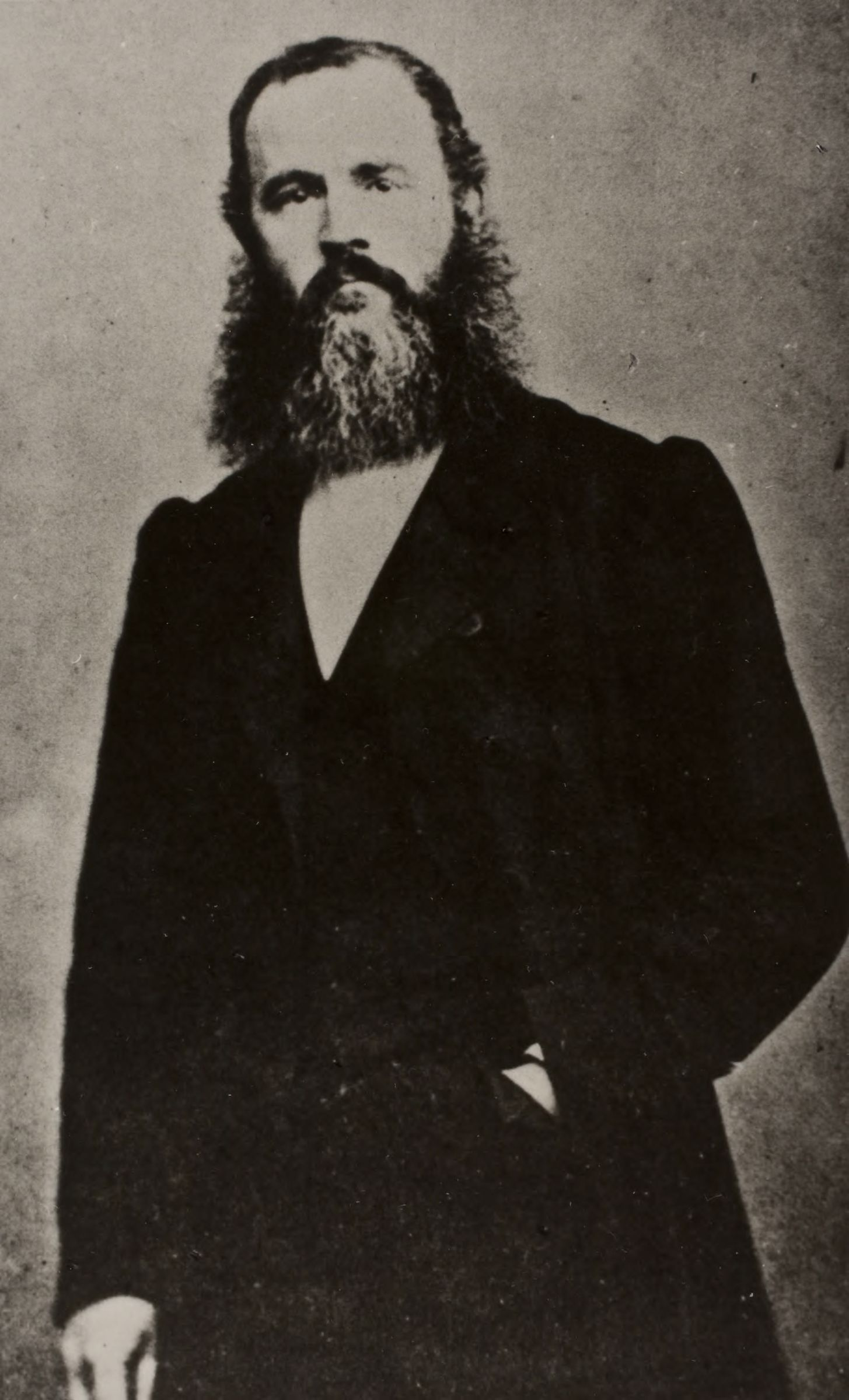 Эрмете Пьеротти (1820 - 1880), архитектор